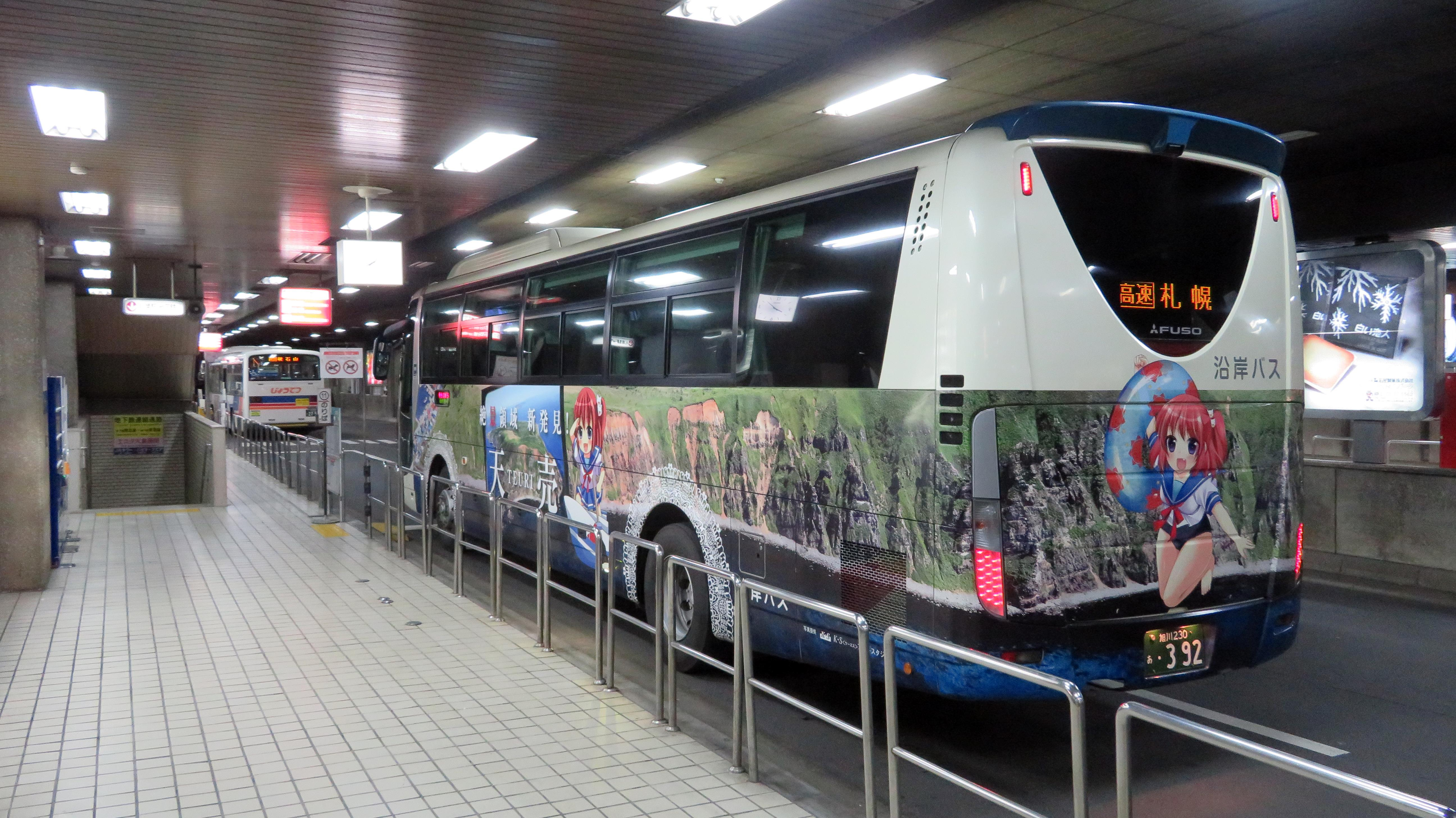 札幌駅バスターミナル（中レーン）